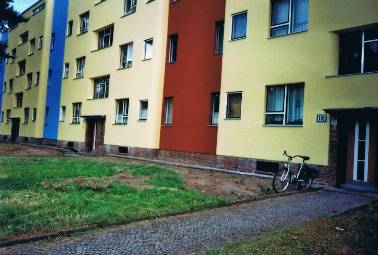 Die Siedlung nach der Sanierung der Fassaden. Foto: Laura de Lang.